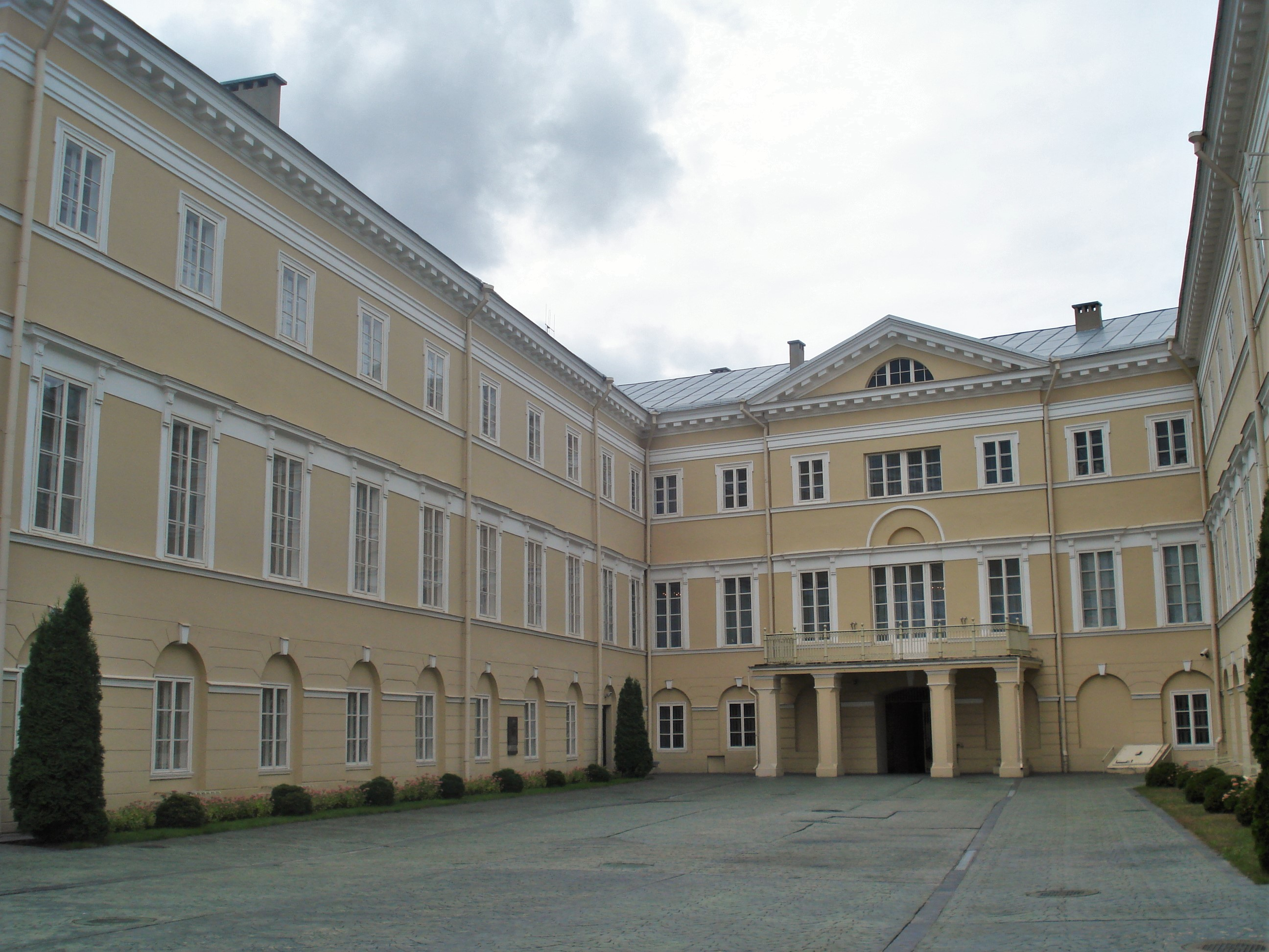 Lithuanian National Art Museum ((Didžioji g. 4 / Bokšto g. 5, Vilnius; Chodkevičių rūmai = Chodkiewicz family palace